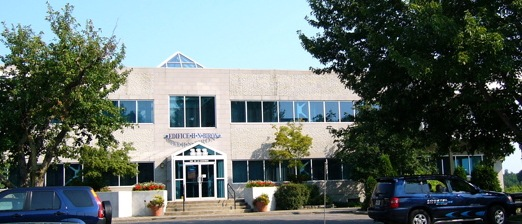 Siège social de Sogetel inc., Nicolet, Québec Source Photo prise par Dominic Germain